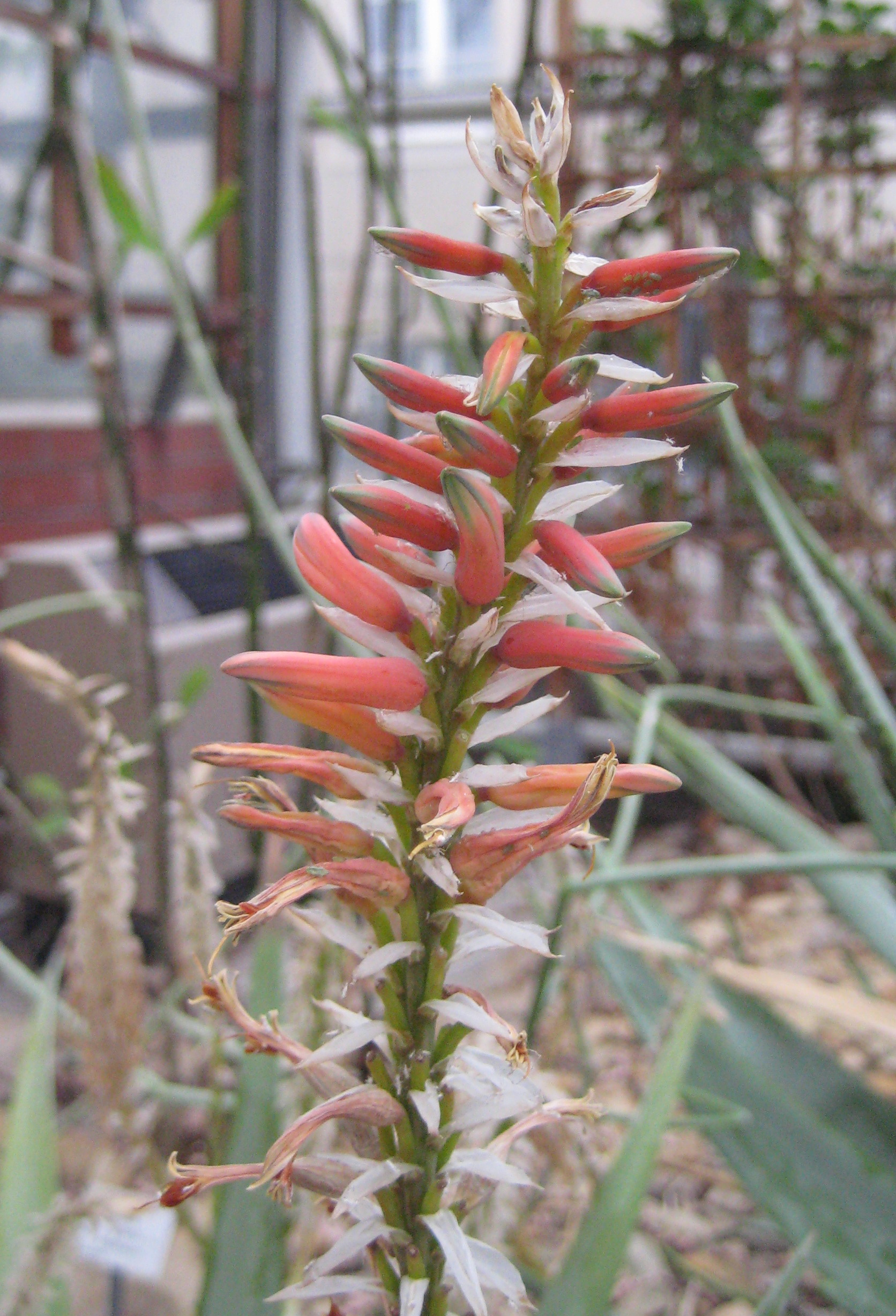 Aloe vacillans im Botanischen Garten Dresden